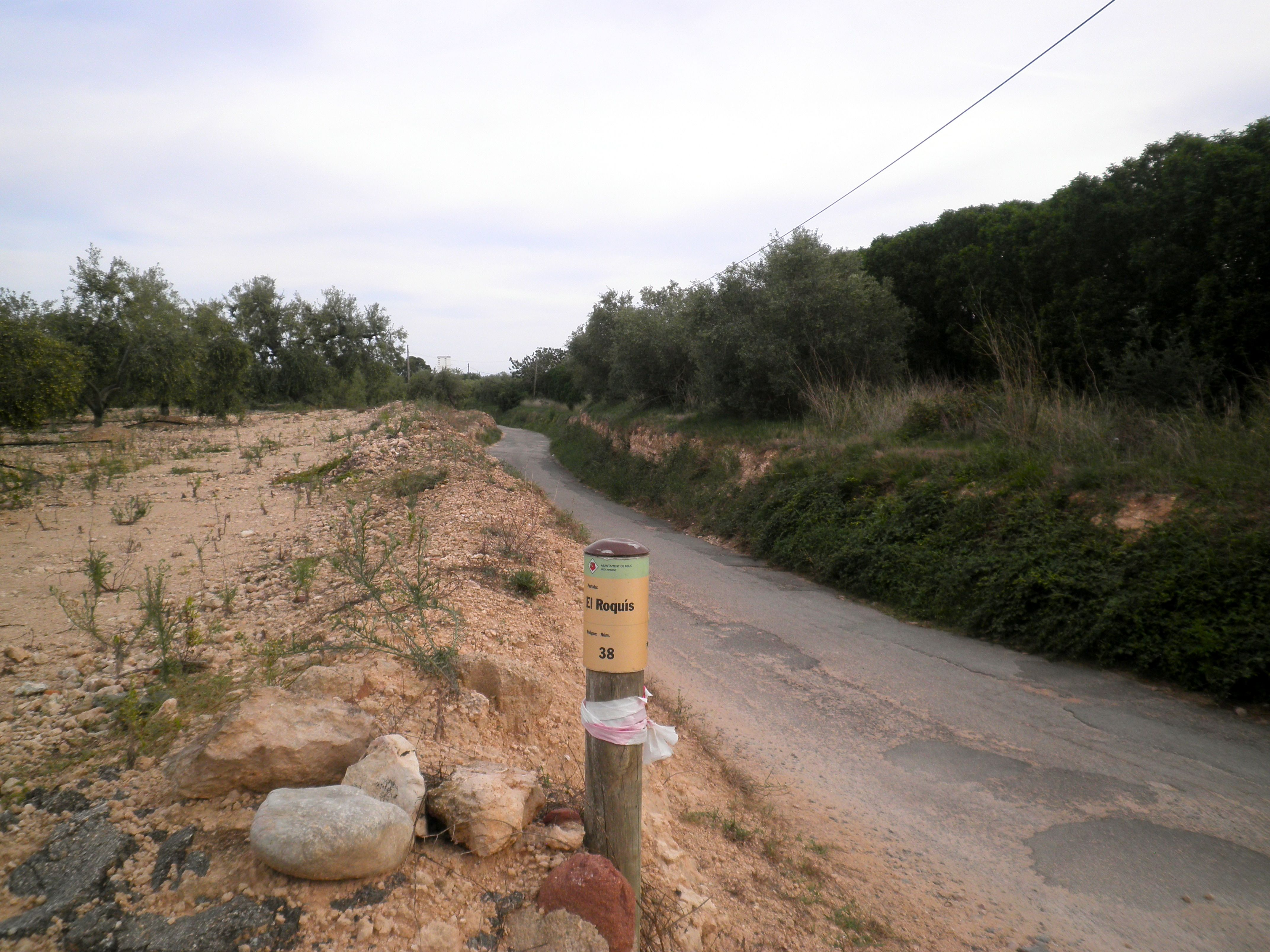 Partida del Roquís, amb el camí, vora el terme de Riudoms